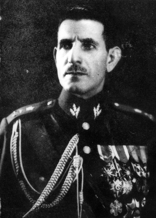 Haj Ali Razmara, prime minister of Iran